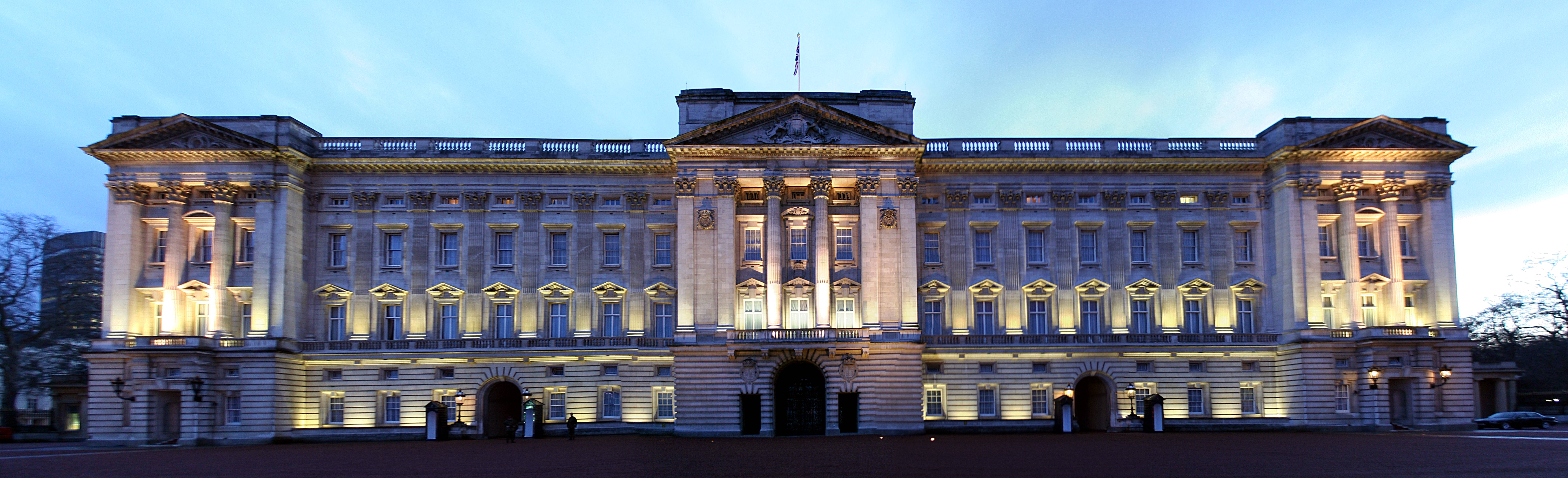 Panorámica del Palacio de Buckingham en un atardecer, Londres.